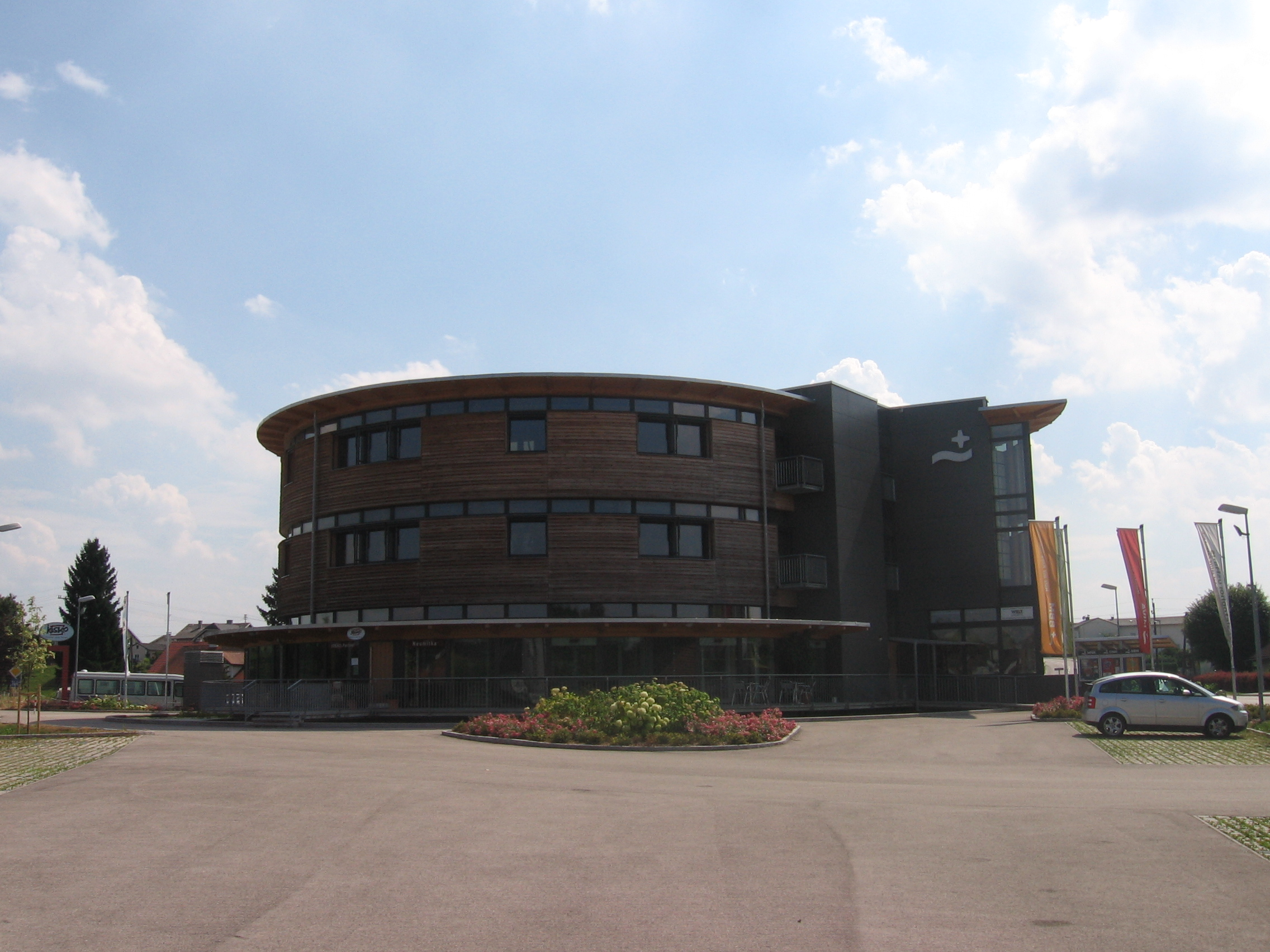 Christopherushaus